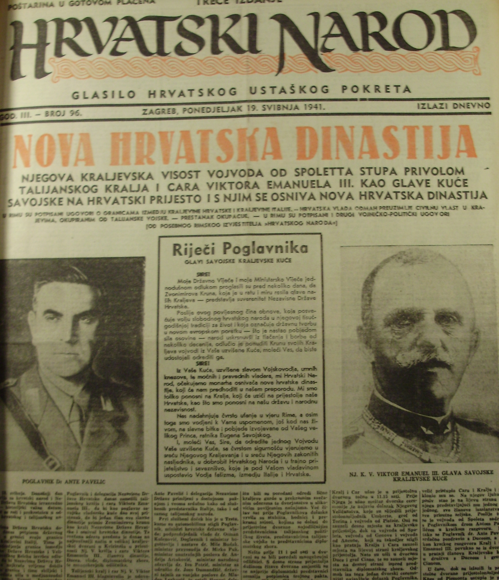 Hrvatski Narod o dinastiji Savoj 19.05.1941.